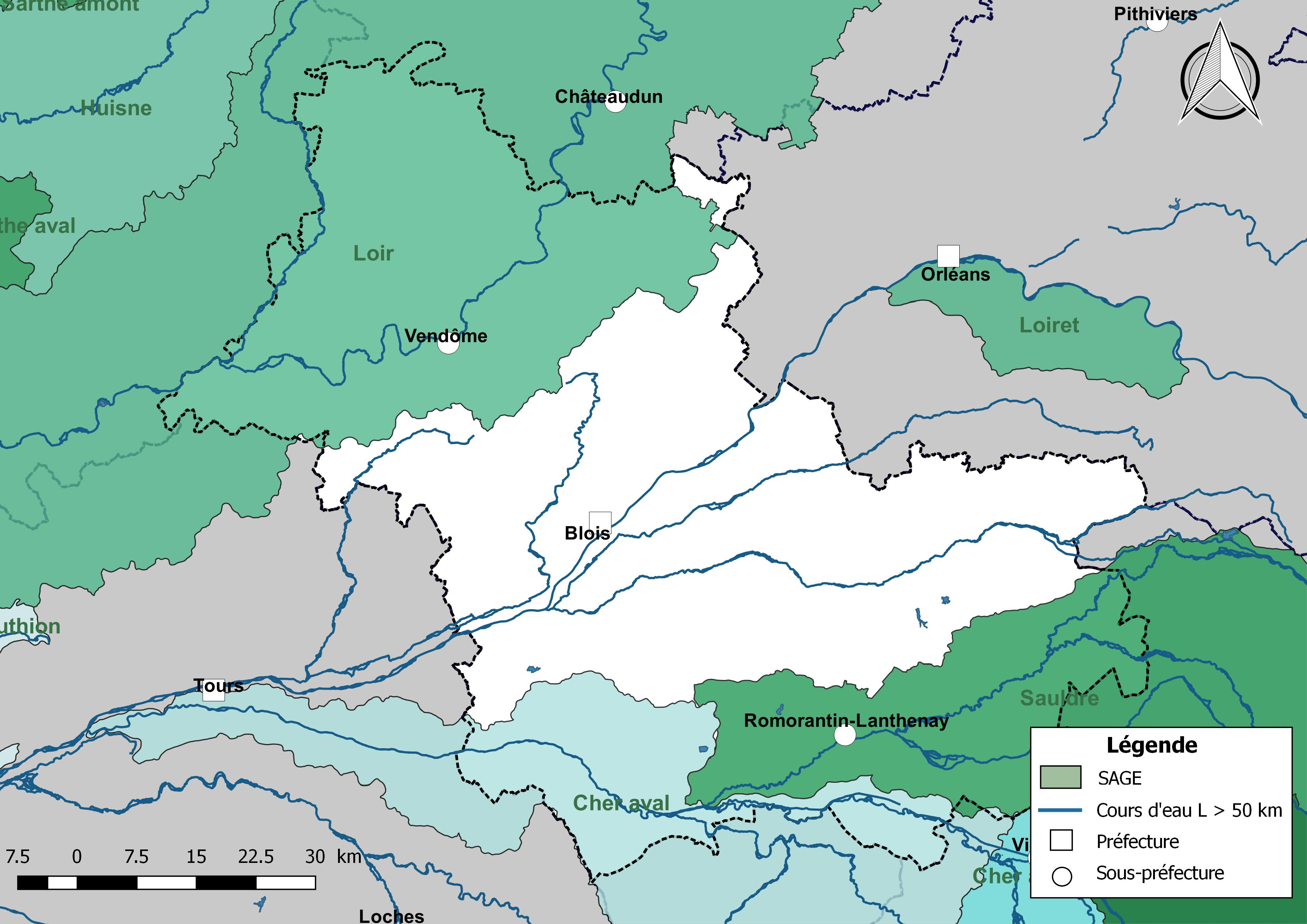 Carte des schémas d'aménagement et de gestion des eaux (SAGE) concernant le département de Loir-et-Cher (France) au 1er janvier 2018.